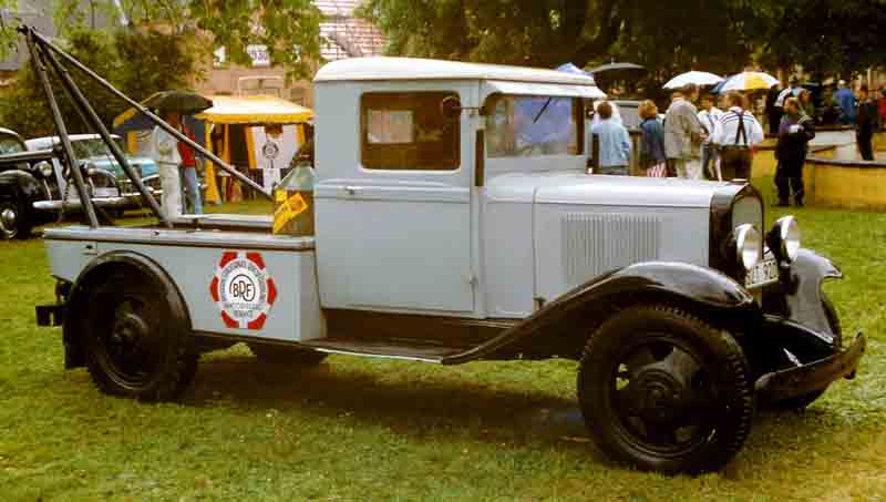 Chevrolet Wrecker 1930